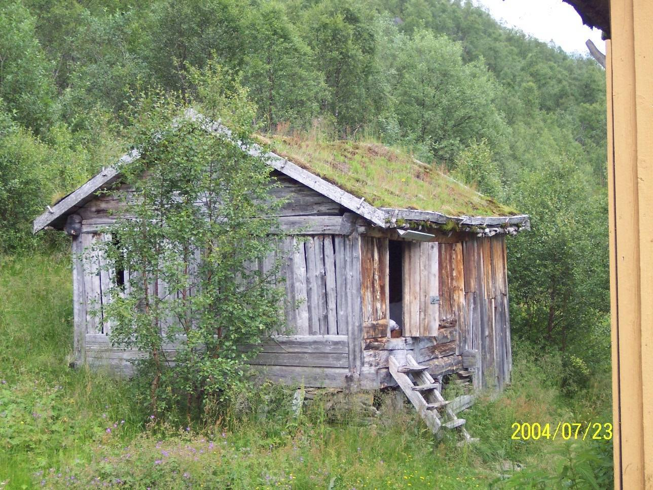 Husmannsstabburd en eller anna plass omtrendt midt i nordland. Bilde tatt av Thor-Rune Hansen.